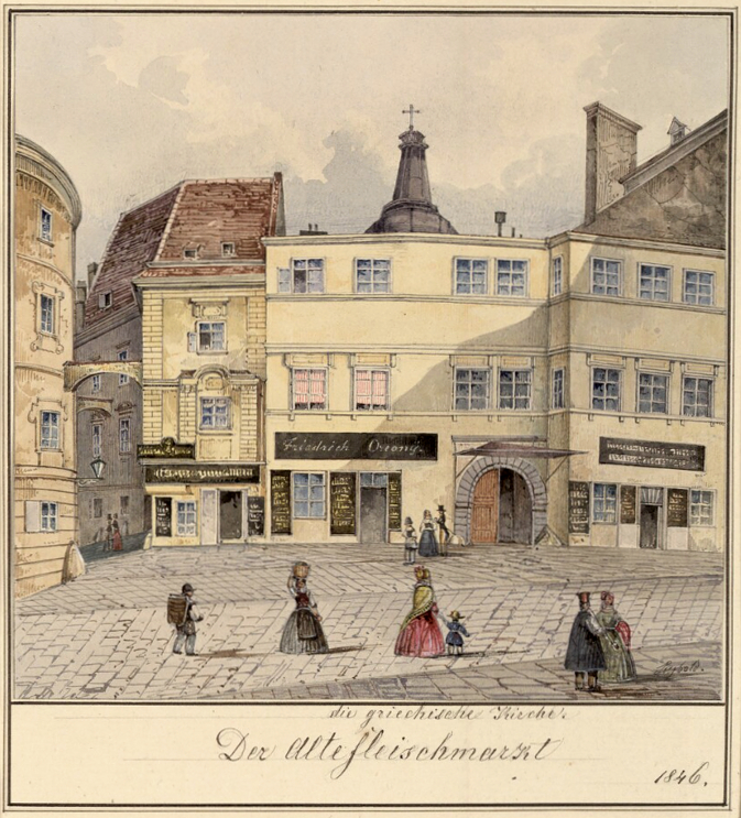 Der alte Fleischmarkt, Wien. Aquarell.